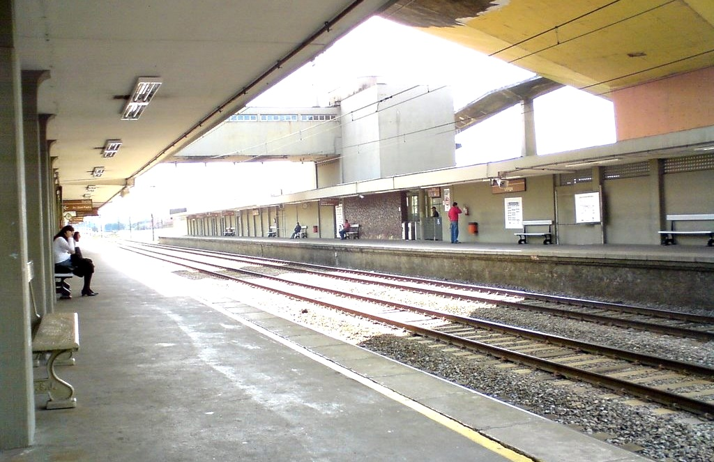 Plataforma da Estação Utinga, em Santo André. Linha 10 da CPTM.